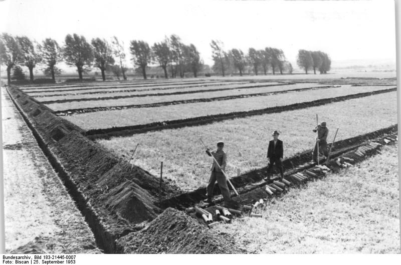 Eilsleben, Verlegen von Drainage Zentralbild Biscan 25.9.1953 1000 ha Kulturland werden gewonnen. Dank der großzügigen Hilfe unserer Regierung, die bisher 800.000 DM zur Verfügung gestellt hat, kann der sogenannte Seelsche Bruch in der Nähe von Eilsleben trockengelegt werden. Zu diesem Zweck werden 70 cm tiefe Gräben durch den ganzen Bruch gezogen und Drainröhren in einer Gesamtlänge von 610 km gelegt. Durch dieses Binnenentwässerung werden 1000 ha Moorwiesen, die mehr als 400 Bauern und Volksgütern der Umgebung gehören, in fruchtbaren Ackerboden verwandelt. UBz: Kreuz und quer ziehen 70 bis 100 Zentimeter tiefe Gräben durch das Seelsche Meer.